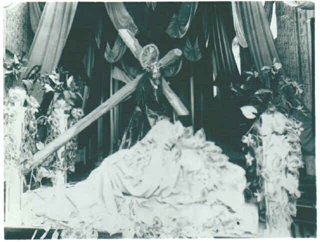 Imagen de Jesús Nazareno de los Milagros, cuando había sido modificado para ser Jesús de la Caída en la década de 1920.